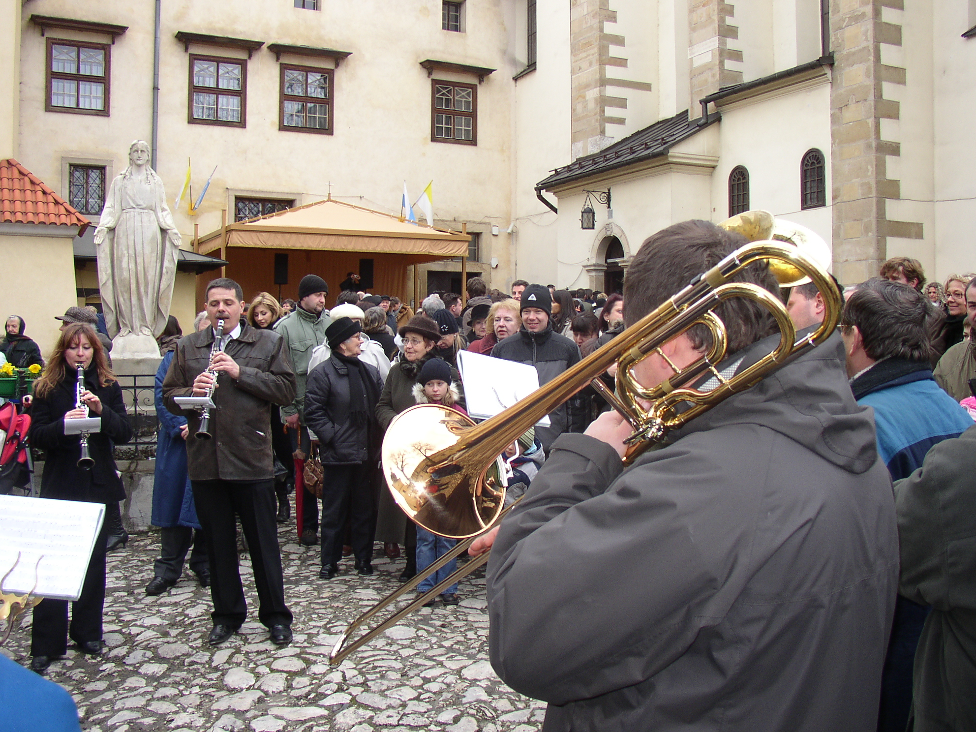 Kraków - Emaus 2008 - orchestra